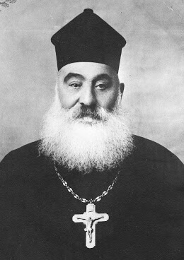 Rum Papaz Igor Yasiciannis